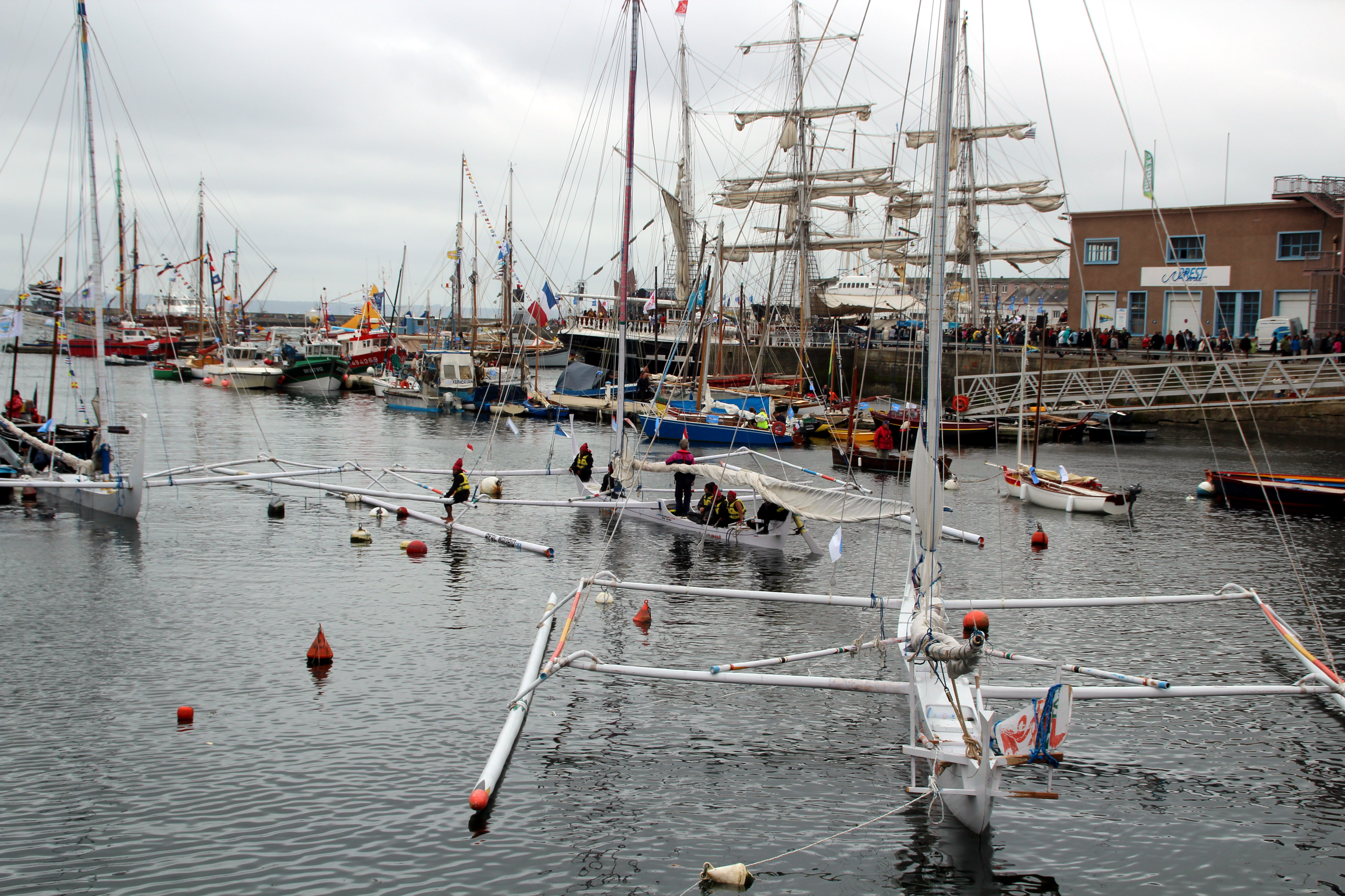 onnerres de Brest 2012-Sandeq bateaux Indonésiens dans un bassin du port